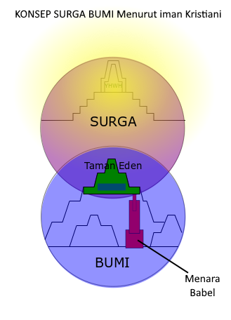 Kitab Kejadian pasal 1 di Alkitab menggambarkan pada mulanya Elohim menciptakan langit dan bumi. Langit di kitab bahasa ibrani disebut sebagai shamayim yang berarti surga. Ini berarti konsep penciptaan awal adalah penciptaan surga dan bumi. Taman Eden digambarkan dalam Alkitab sebagai taman yang berada di tempat yang lebih tinggi dari bumi tetapi bisa terjangkau dari bumi, dan posisinya bukan disurga tetapi seperti di surga. Berdasarkan konsep tabernakel, yaitu ruang kudus bait suci, digambarkan seperti taman eden, yaitu tempat dimana kekudusan Tuhan dan dunia fana bertemu. Konsep ini digambarkan dalam dua lingkaran yang saling bersinggungan / berpotongan dimana mahluk sorgawi dan mahluk bumi dapat bertemu. Juga digambarkan ketika manusia mencoba membuat menara babel, dimana puncaknnya direncanakan sampai kepada taman eden.